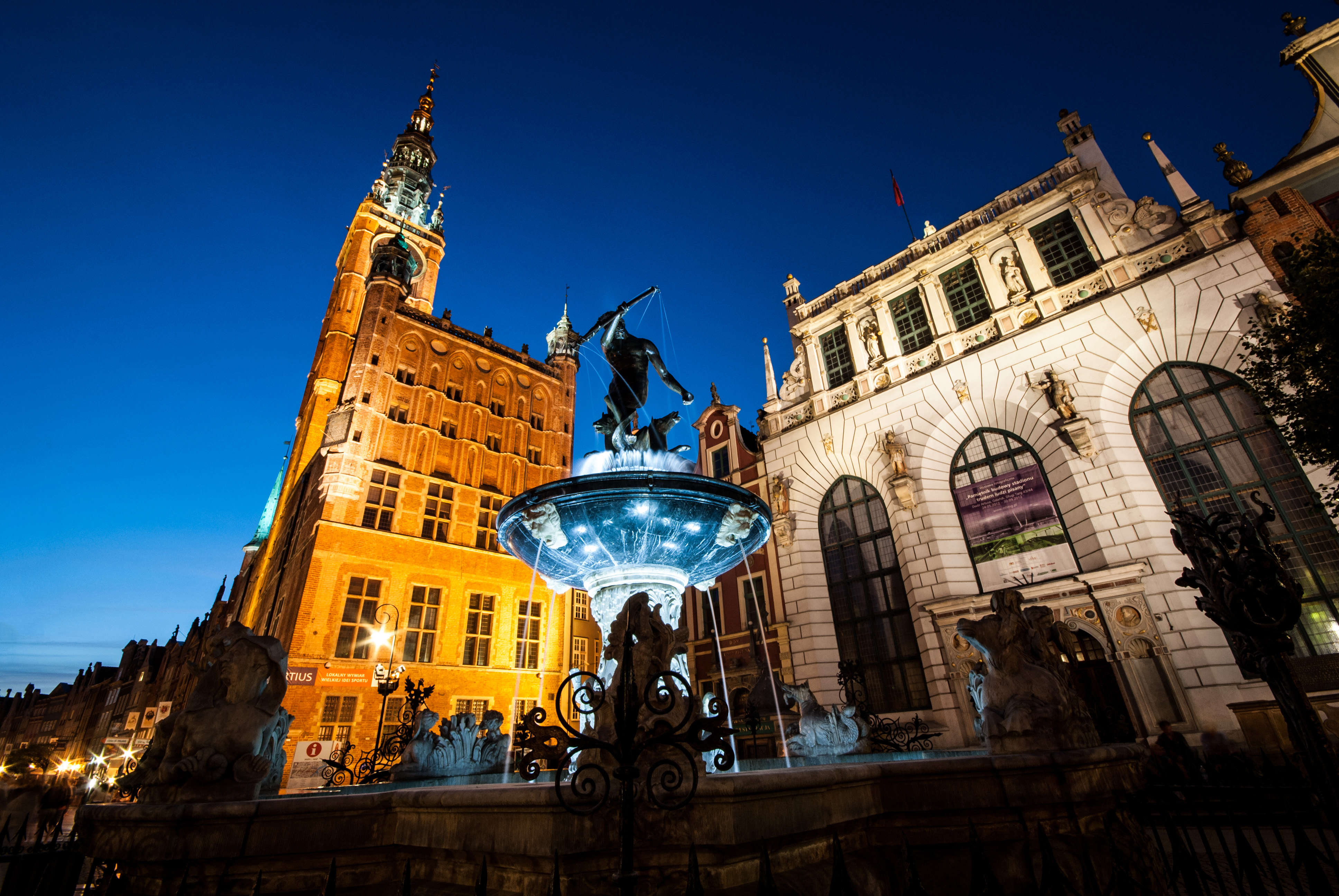 Ratusz Głównego Miasta, fontanna Neptuna i Dwór Artusa na ul. Długi Targ, Gdańsk, woj. Pomorskie.